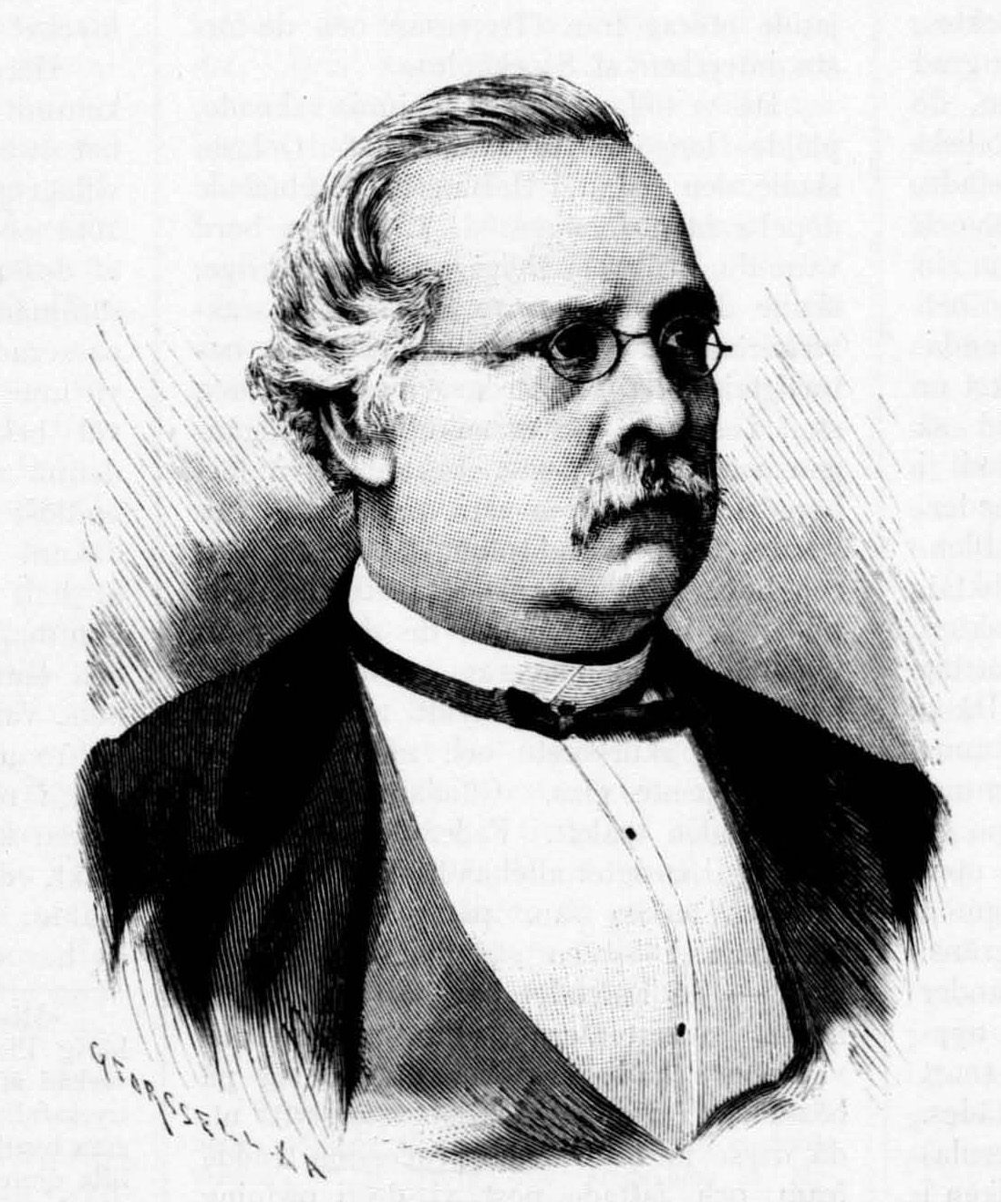 Per August Ölander (1824-1886)